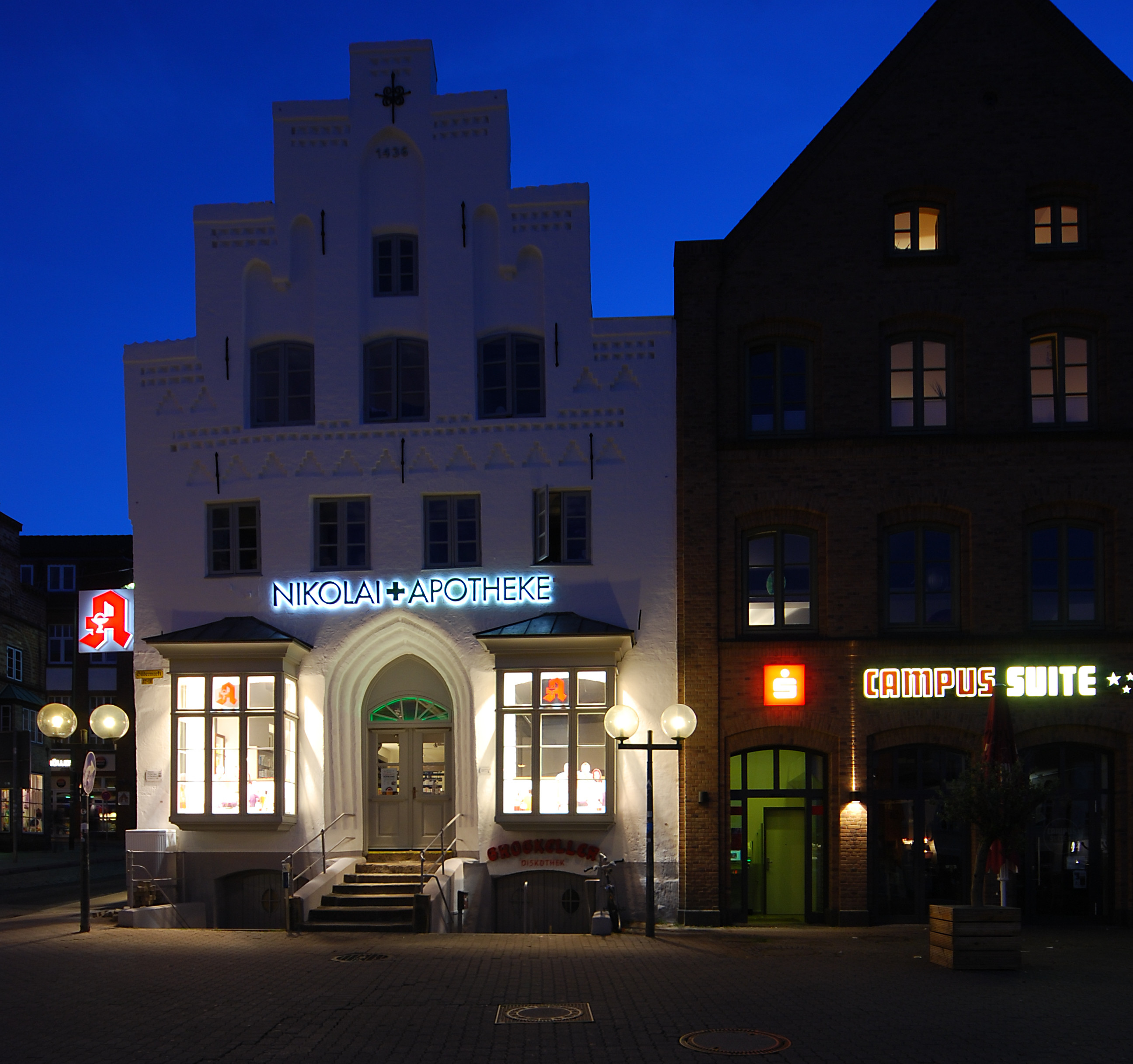 Apotheke und Wohnhaus an der Straße Südermarkt im Stadtteil Altstadt der kreisfreien Stadt Flensburg in Schleswig-Holstein